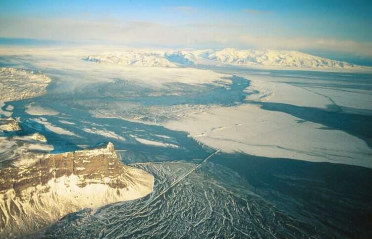 jökulhlaup